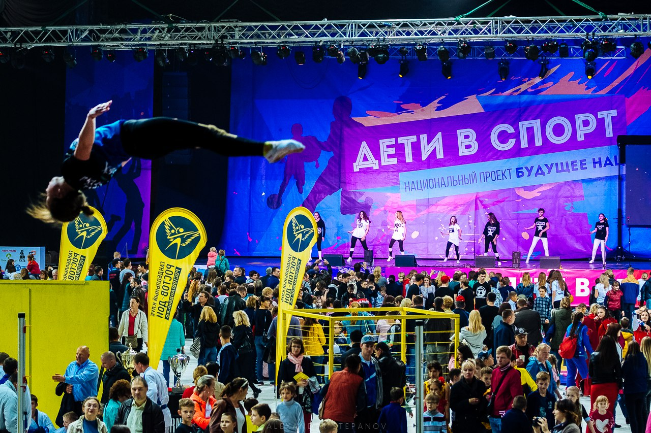 Зал с гостями ежегодного фестиваля «Дети в спорт», который проводится во дворце спорта города Ростова-на-Дону.